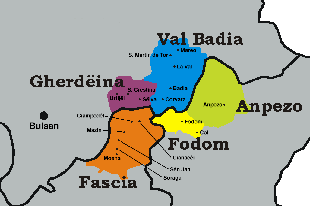 Ortsnamen der Hauptorte (Gemeinden) in den ladinischen Tälern von Gherdëina, Val Badia, Anpezo, Fodom und Fascia.